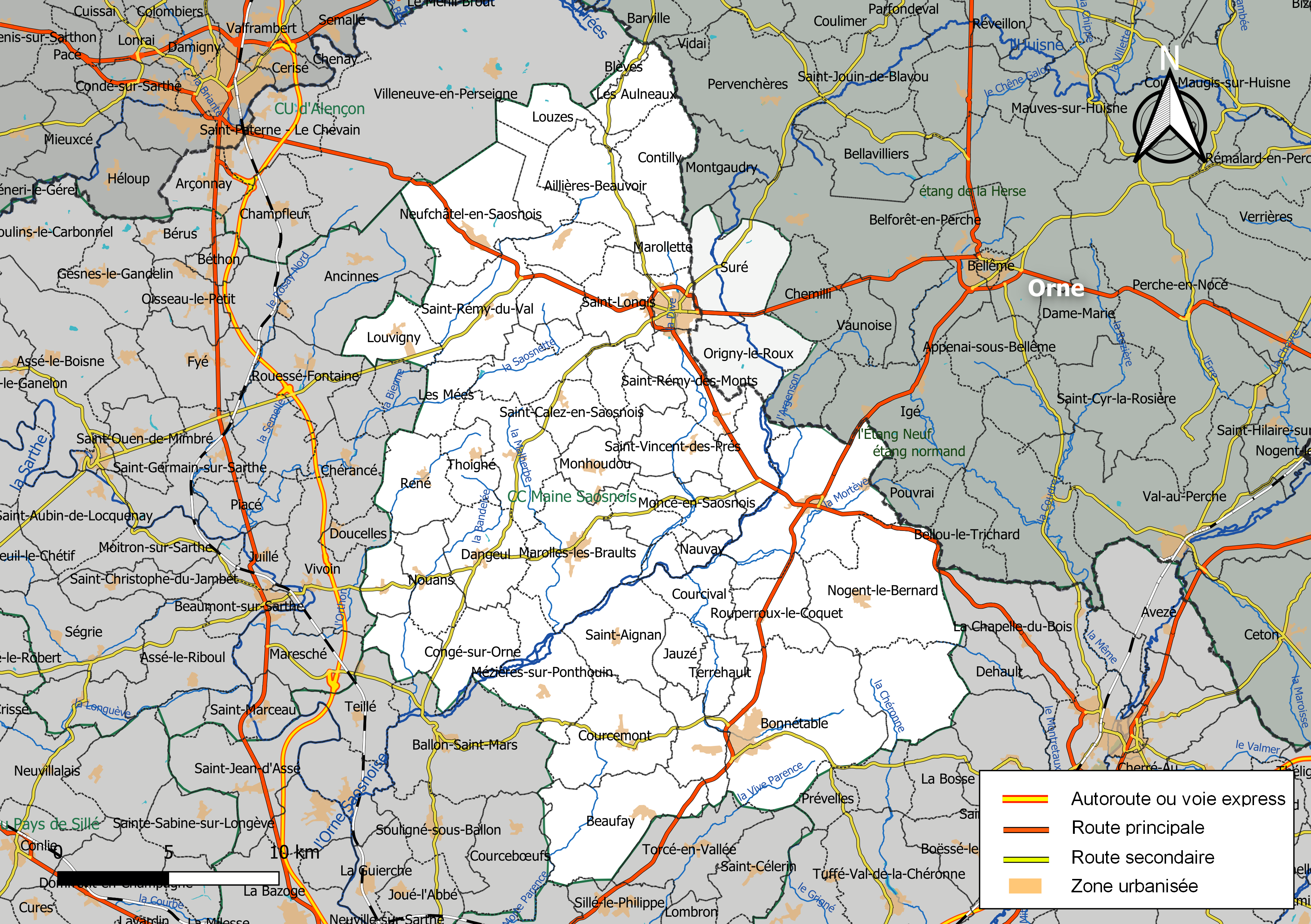 Carte géographique de la Communauté de communes Maine Saosnois, département de la Sarthe, France. Composition au 1er janvier 2019.